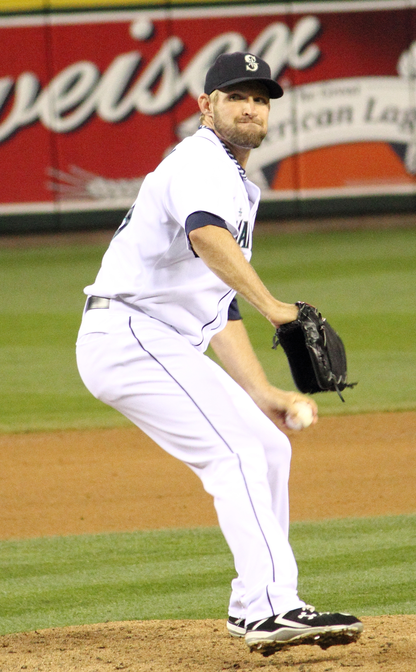 Garrett Olson